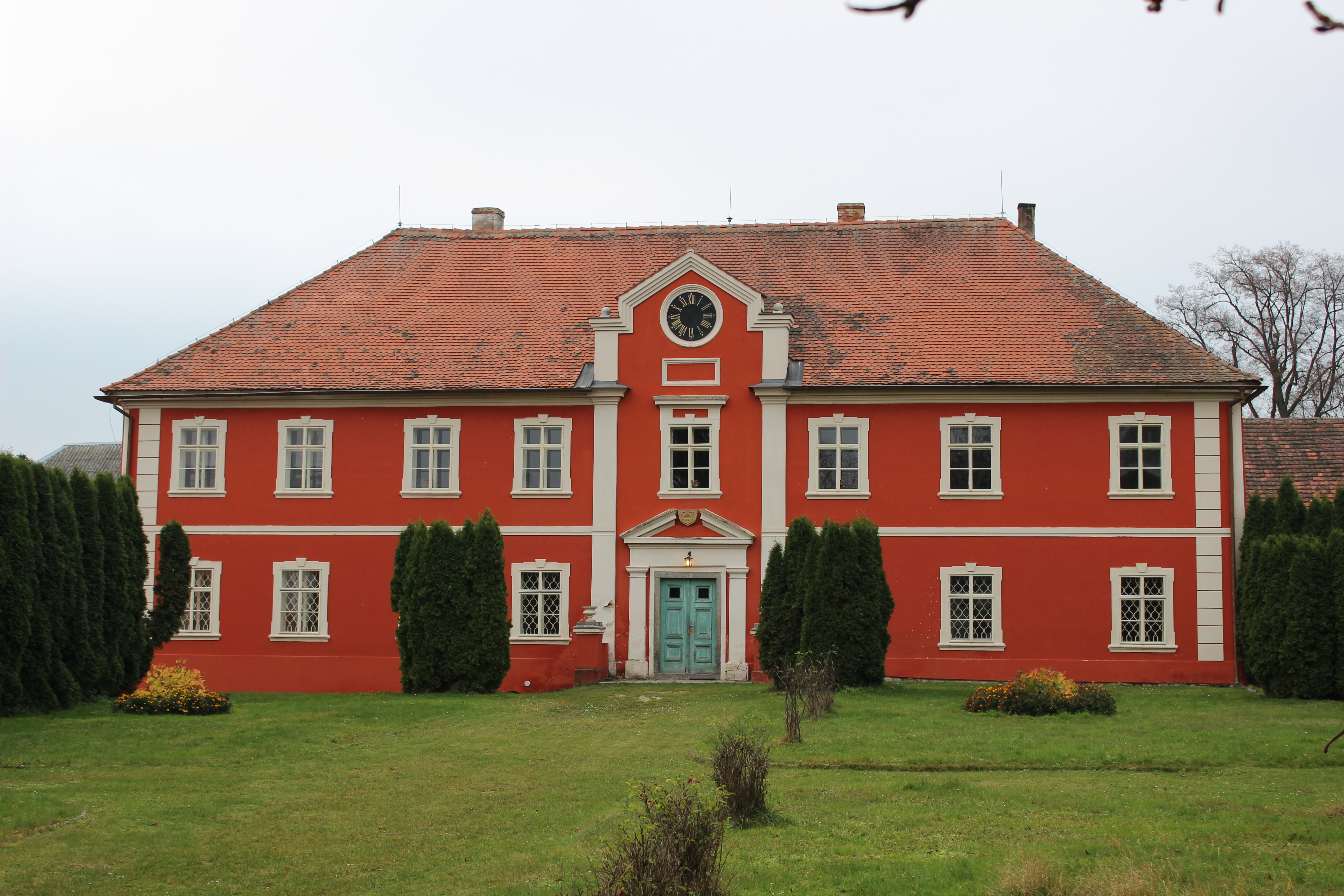 Zámek. Hoštice (okres Strakonice). Česká republika.